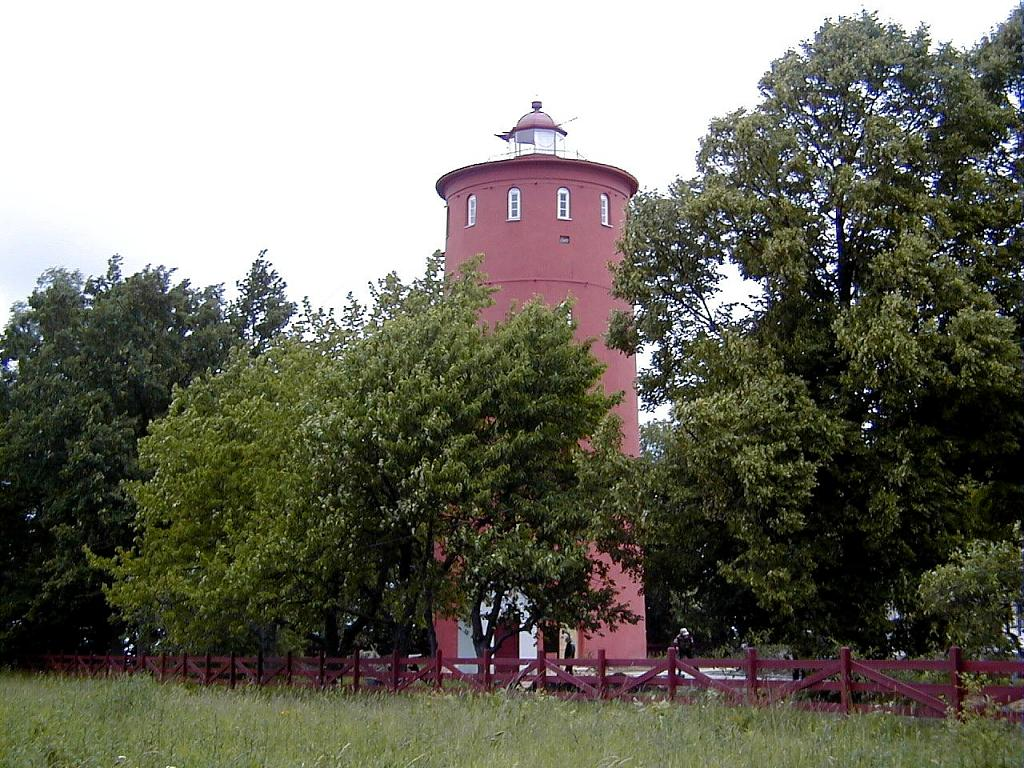 Šlīteres bāka 2002-06-24